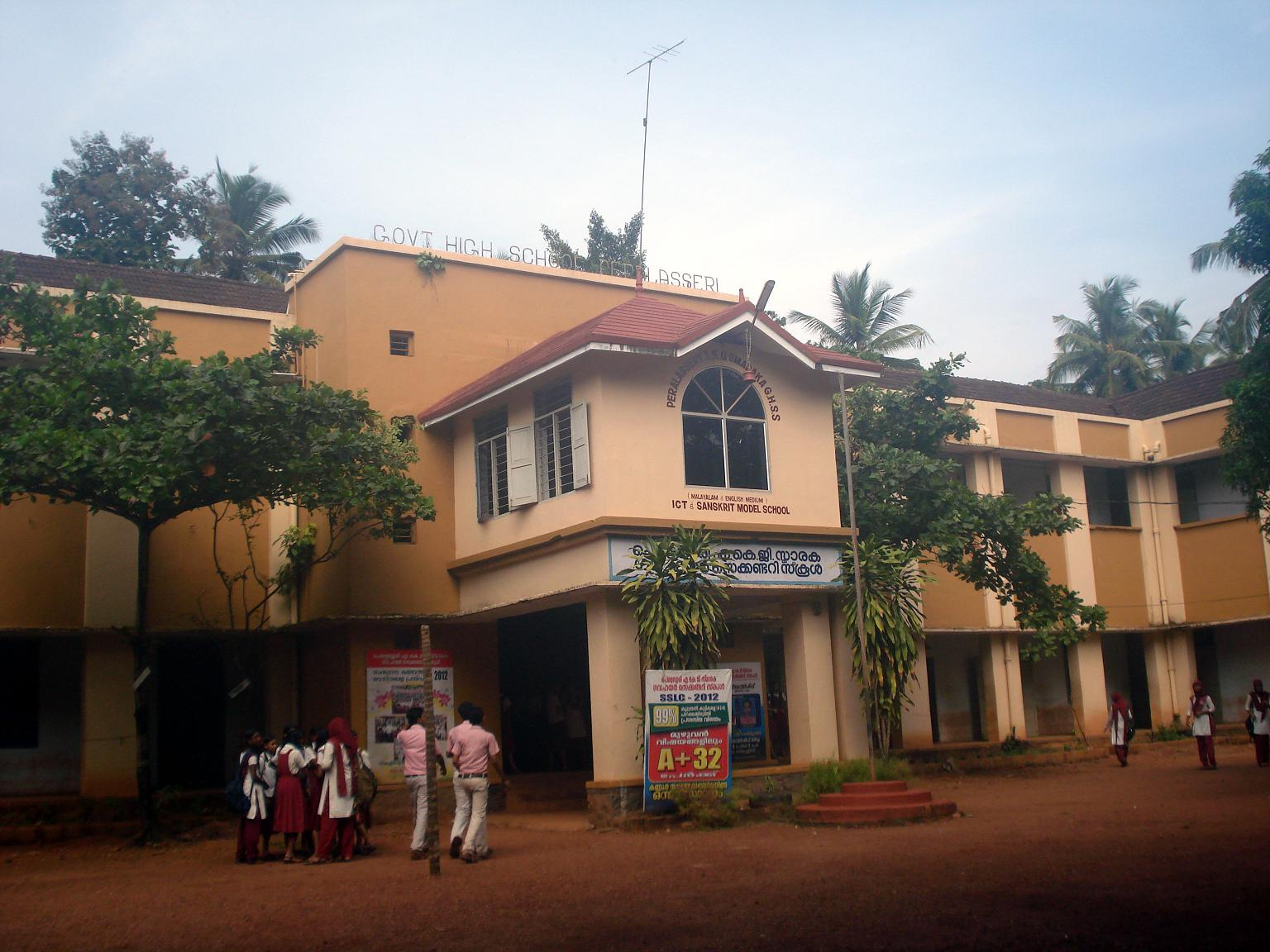 കേരളത്തിൽ കണ്ണൂർ ജില്ലയിലെ പെരളശ്ശേരി പഞ്ചായത്തിലുള്ള ഗവണ്മെന്റ് ഹയർ സെക്കന്ററി സ്ക്കൂൾ. കമ്മ്യൂണിസ്റ്റ് നേതാവ് ഏ.കെ.ജി.യുടെ ജന്മസ്ഥലത്തായതിനാൽ അദ്ദേഹത്തിന്റെ പേരിൽ അറിയപ്പെടുന്നു. അഞ്ച് മുതൽ പ്ലസ് 2 വരെയുള്ള ക്ലാസ്സുകളിലെ വിദ്യാർത്ഥികൾ ഇവിടെ പഠിക്കുന്നുണ്ട്. സ്ക്കൂൾ സ്ഥിതി ചെയ്യുന്നത് പെരളശ്ശേരി അമ്പലത്തിന് സമീപം മുണ്ടലൂർ എന്ന സ്ഥലത്ത് കണ്ണൂർ-കൂത്തുപറമ്പ് പാതയോരത്താണ്. കണ്ണൂർജില്ലയിൽ ഉന്നത വിജയശതമാനം നേടുന്ന ഒരു ഗവണ്മെന്റ് ഹയർ സെക്കന്ററി സ്ക്കൂളാണ്.